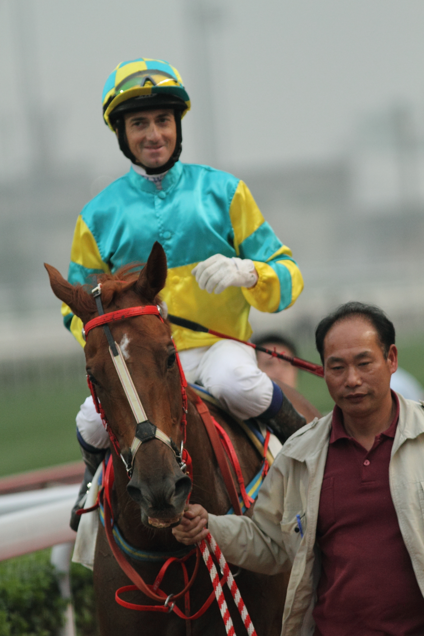 中文（香港）: 香港騎師韋達，攝於沙田馬場